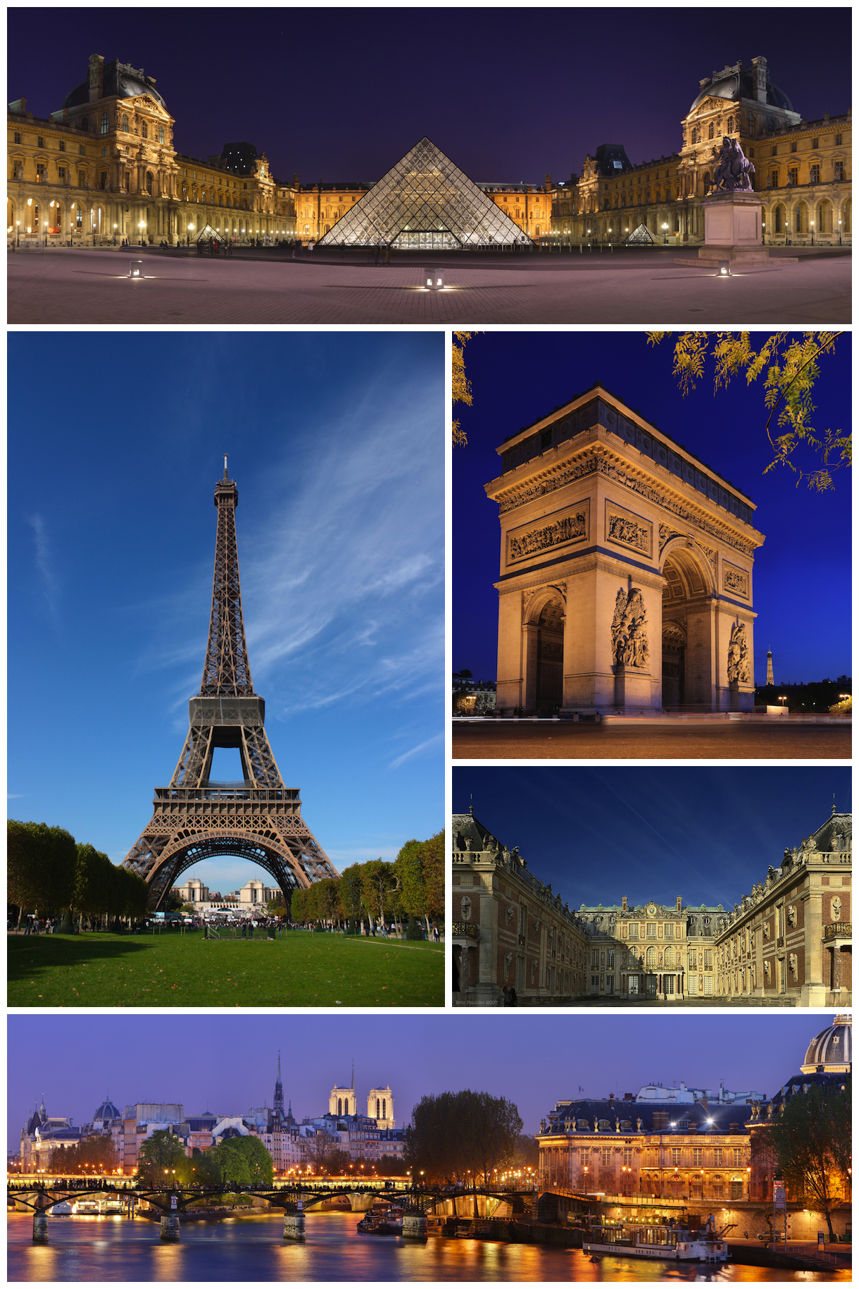 Paris